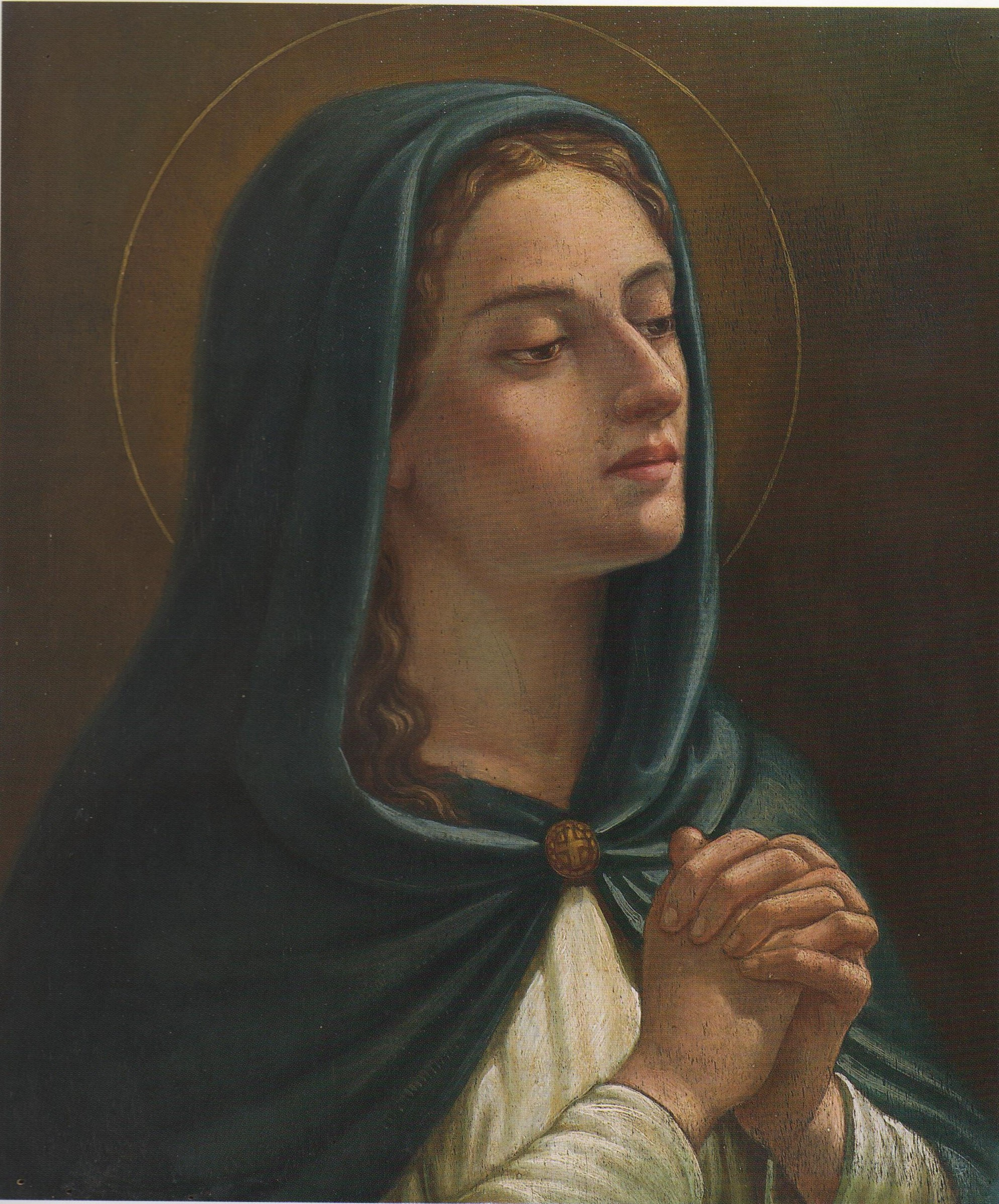 Guido Antonio Margoni, 1940 olio su tavola cm.57x47